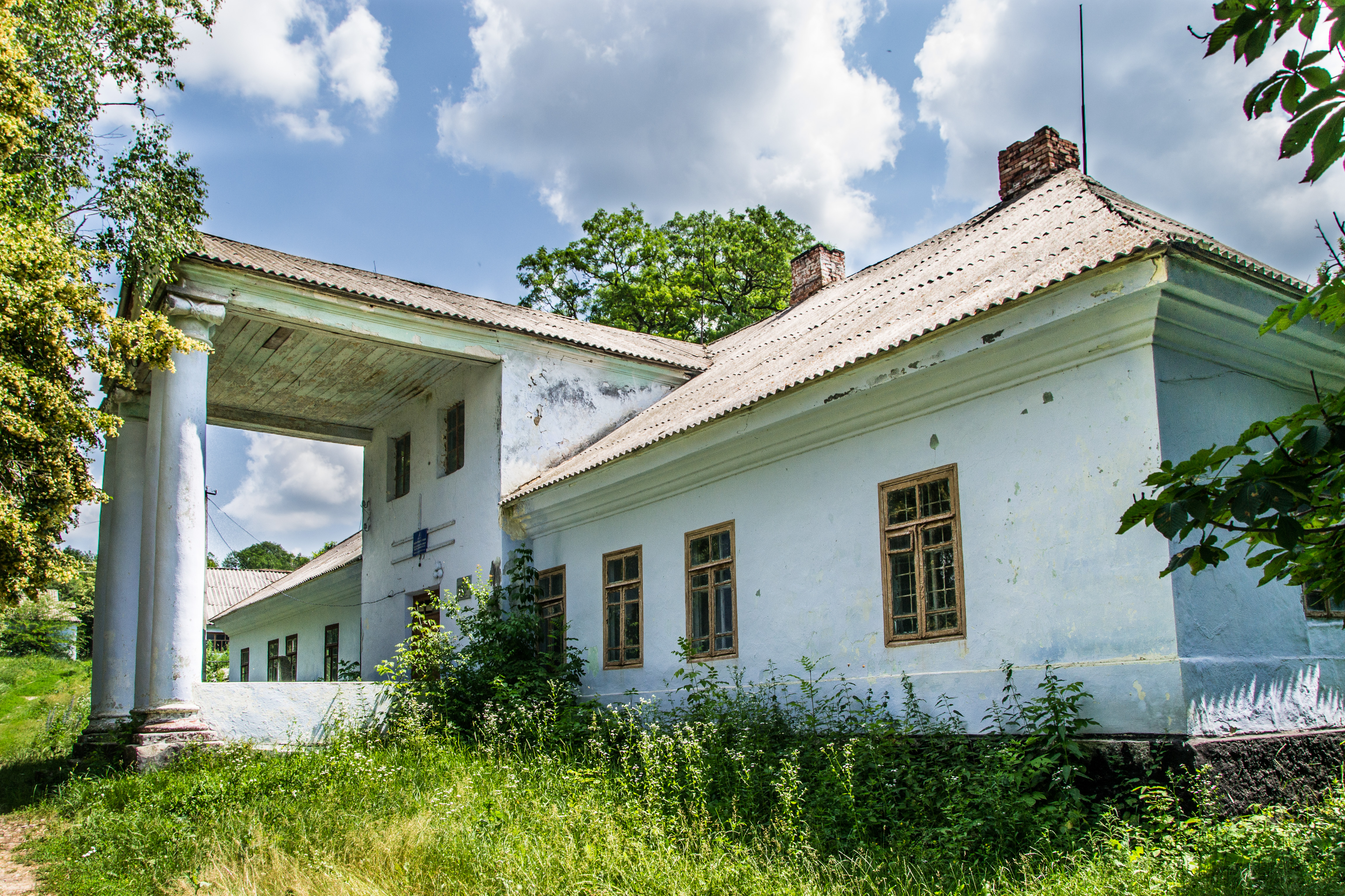 Садибний будинок Колосовських, Вінож, вул.Пархоменко,16